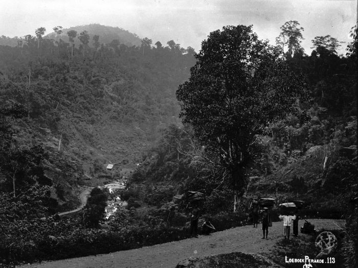 Foto. Weg door de bergen, Loeboekperakoe